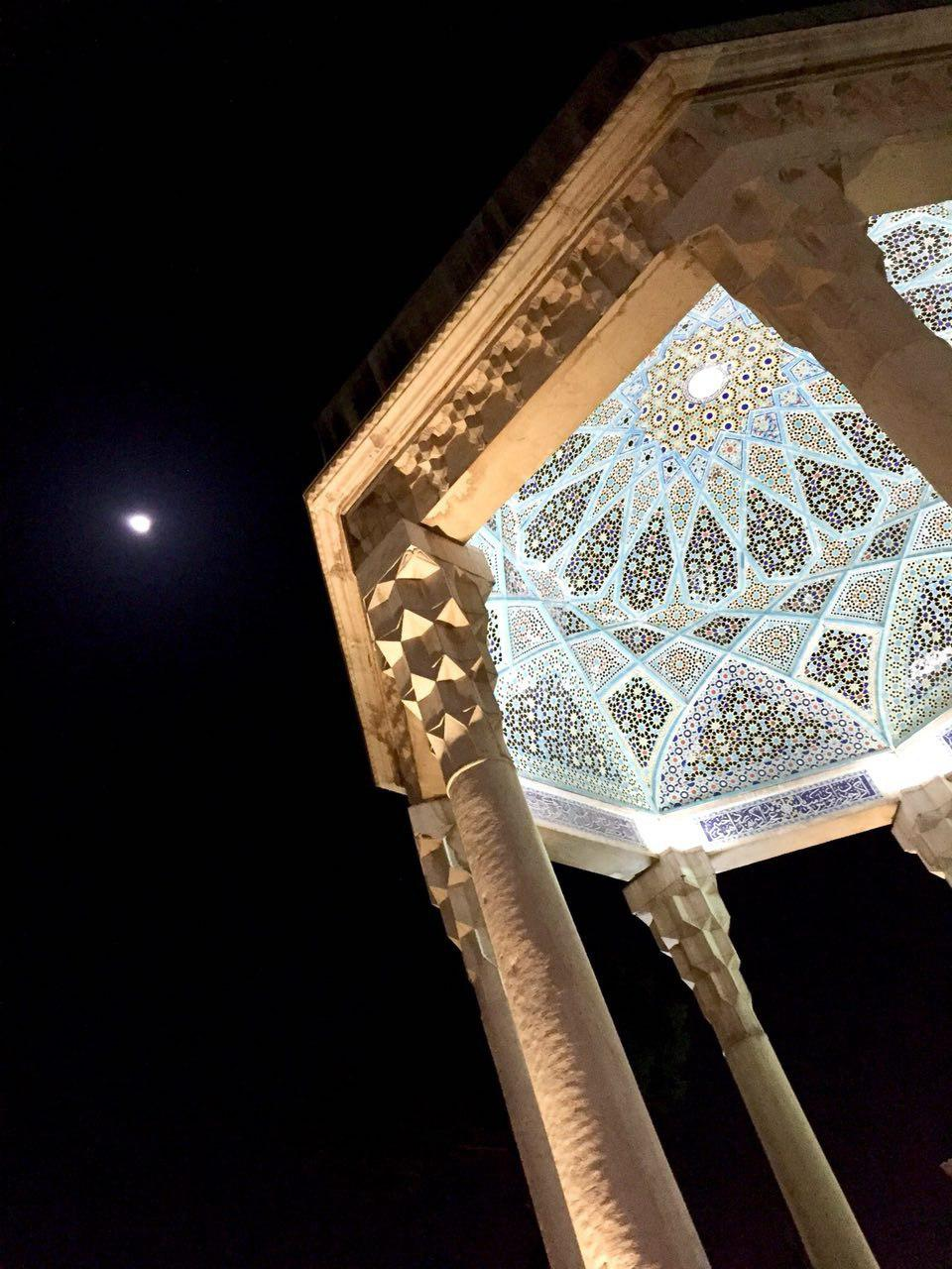 حافظیه